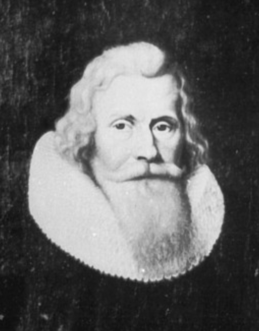 Otto Brokes († 24. August 1652), Lübecker Ratsherr